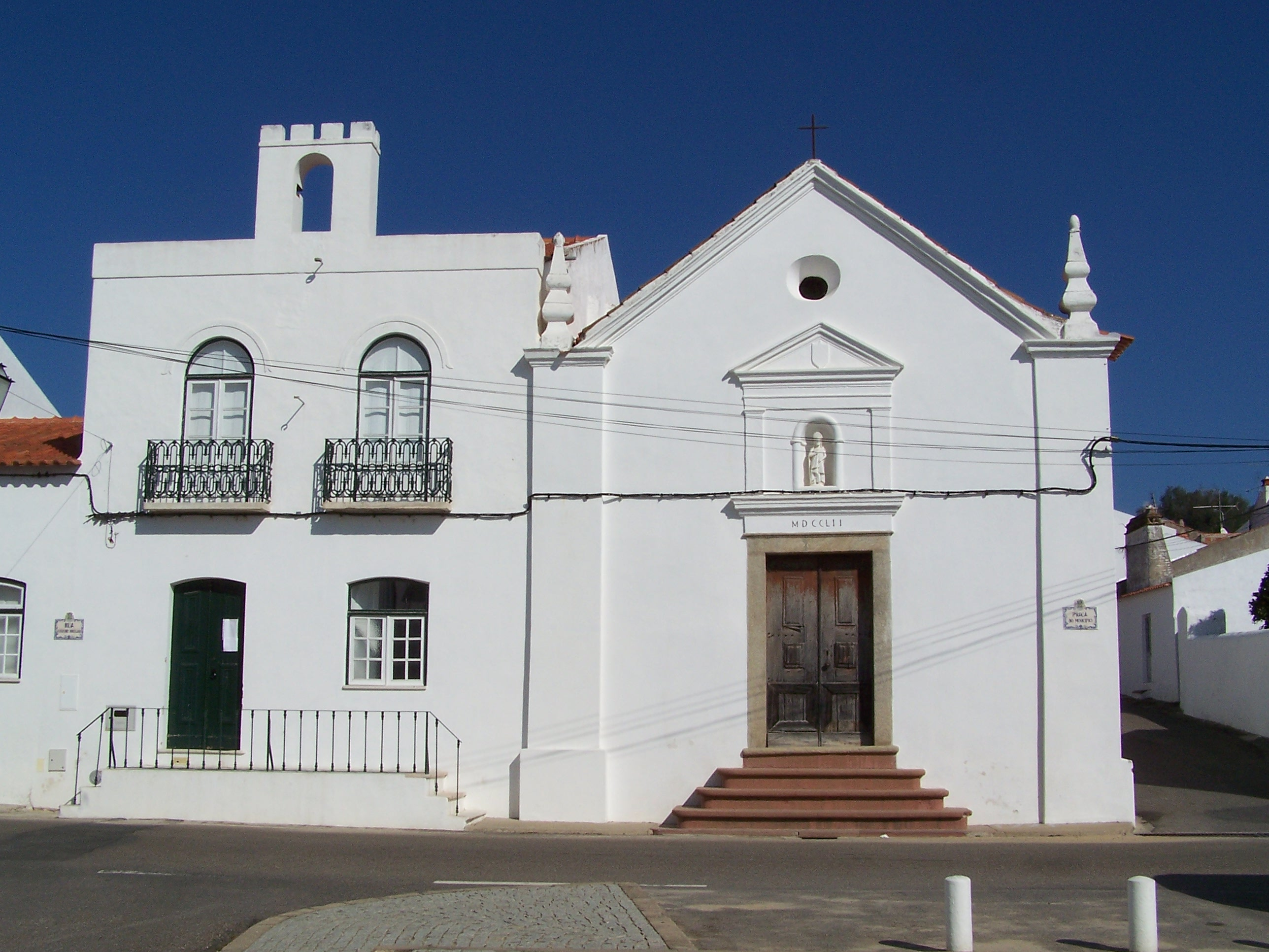 Cabeção- Igreja e Hospital da Misericórdia de Cabeção